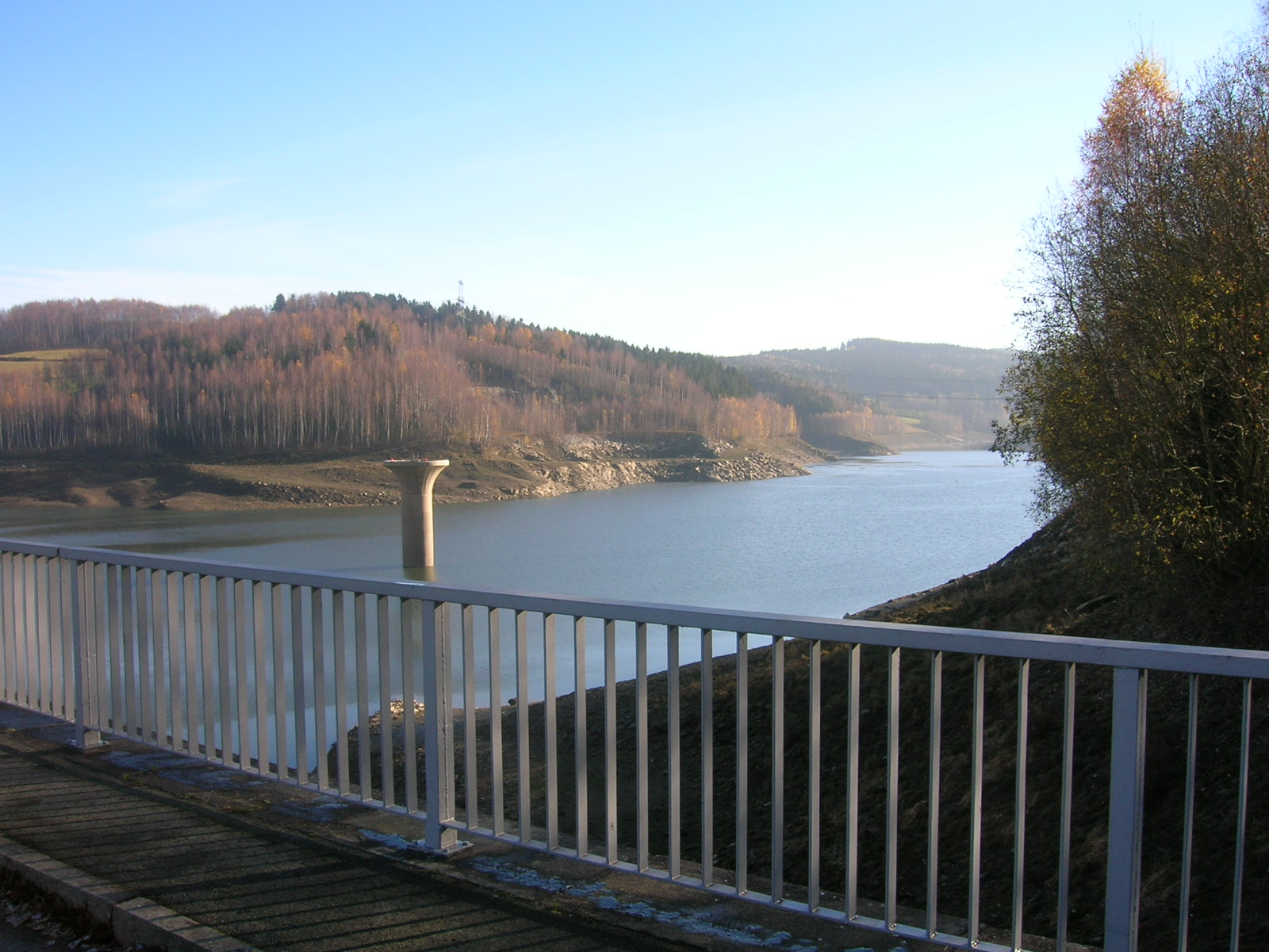 Pumpspeicherwerk Markersbach, Talsperre (Unterbecken)